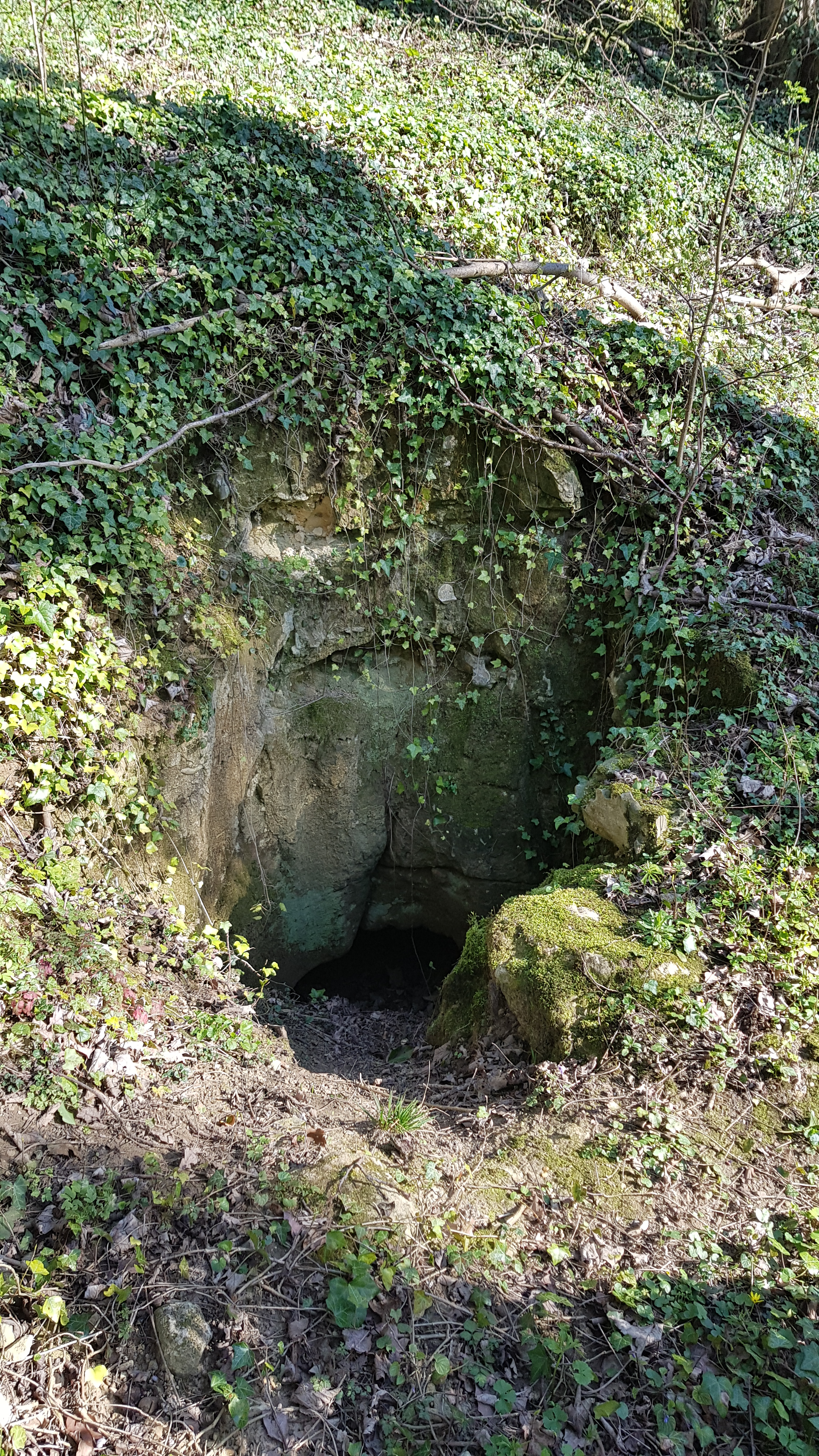 Ingvarsputje, Valkenburg, Nederland